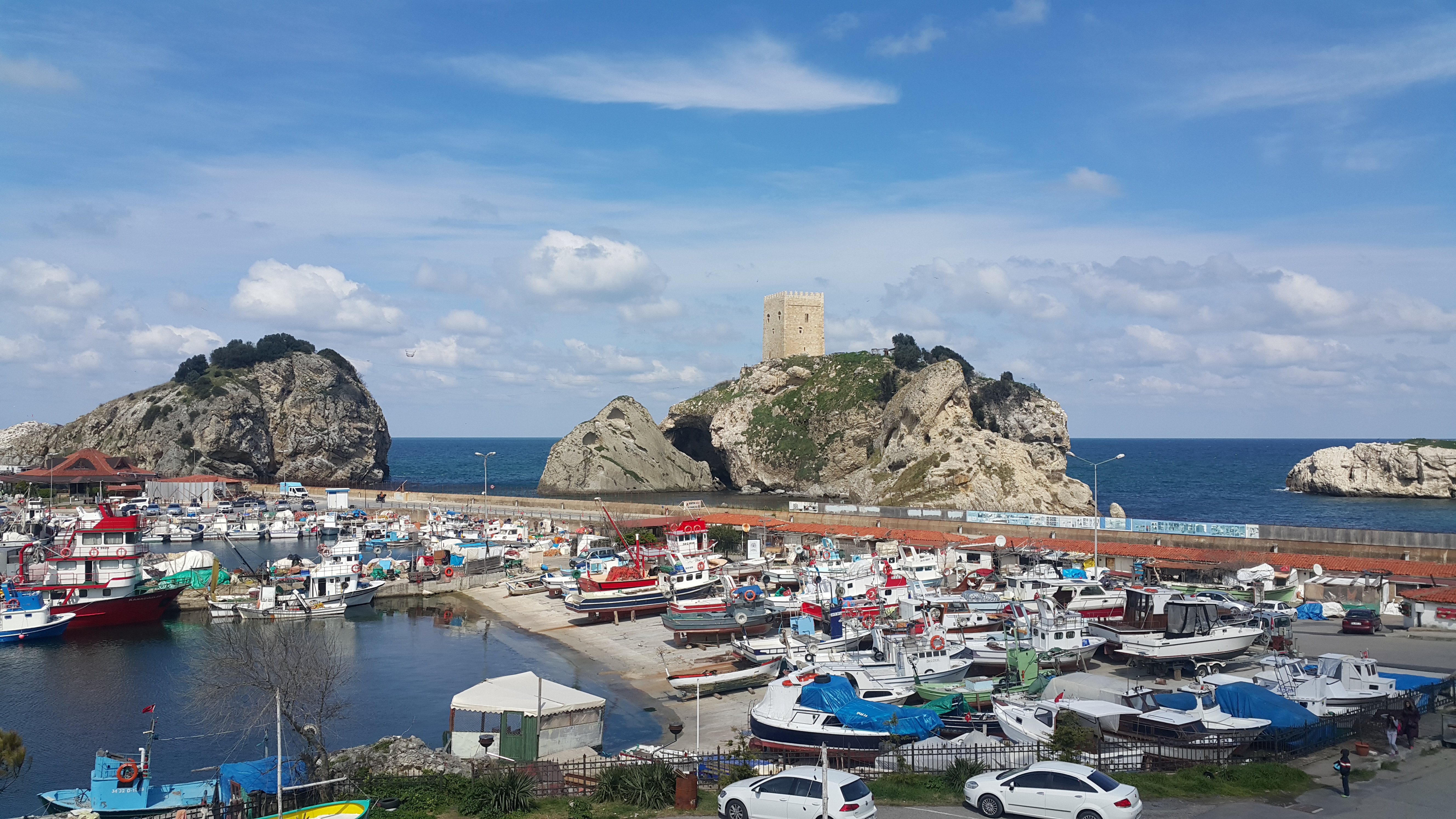 Şile Kalesi